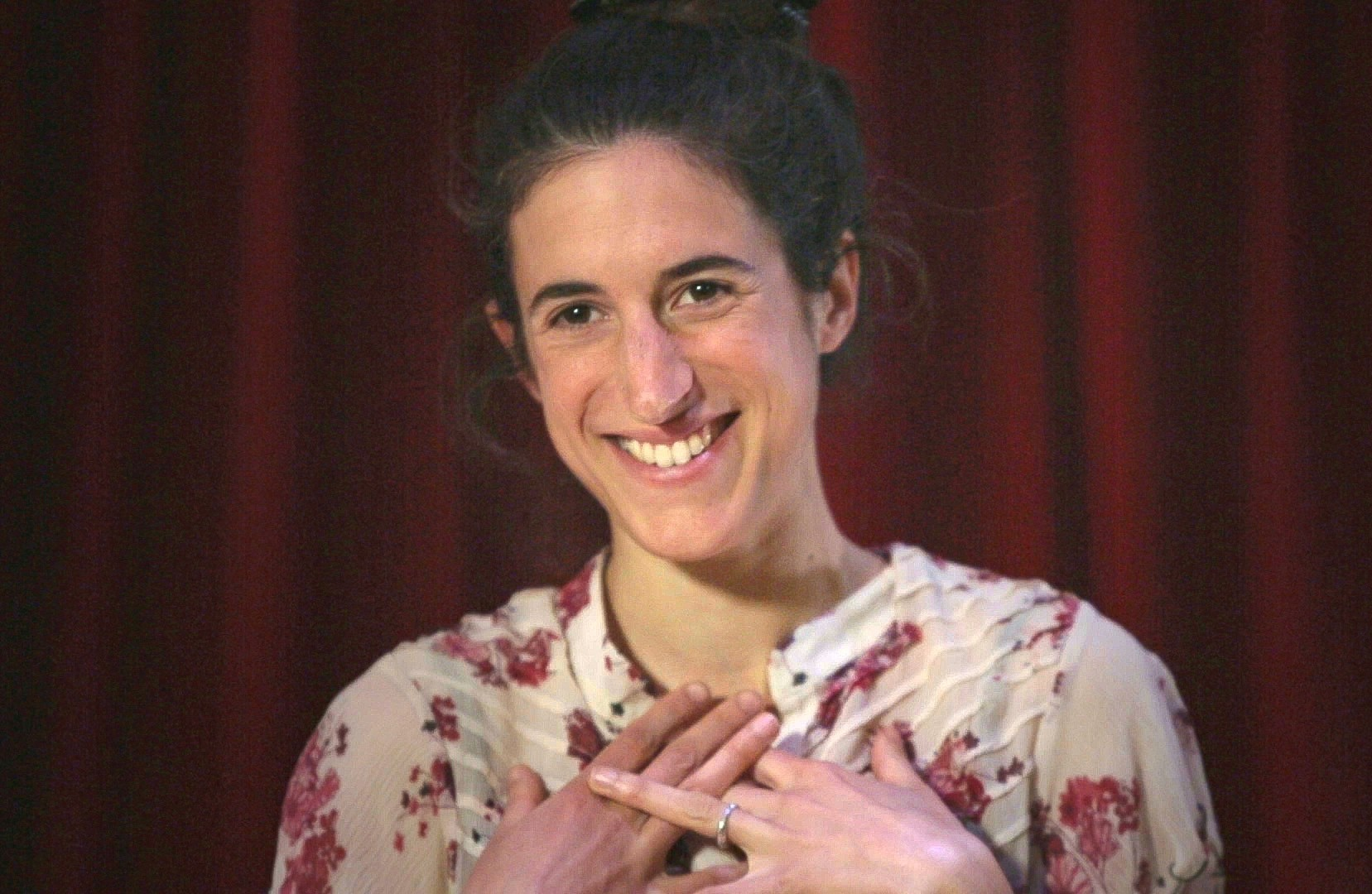 Maika Etxekopar "Harian" ikuskizuneko une batean.